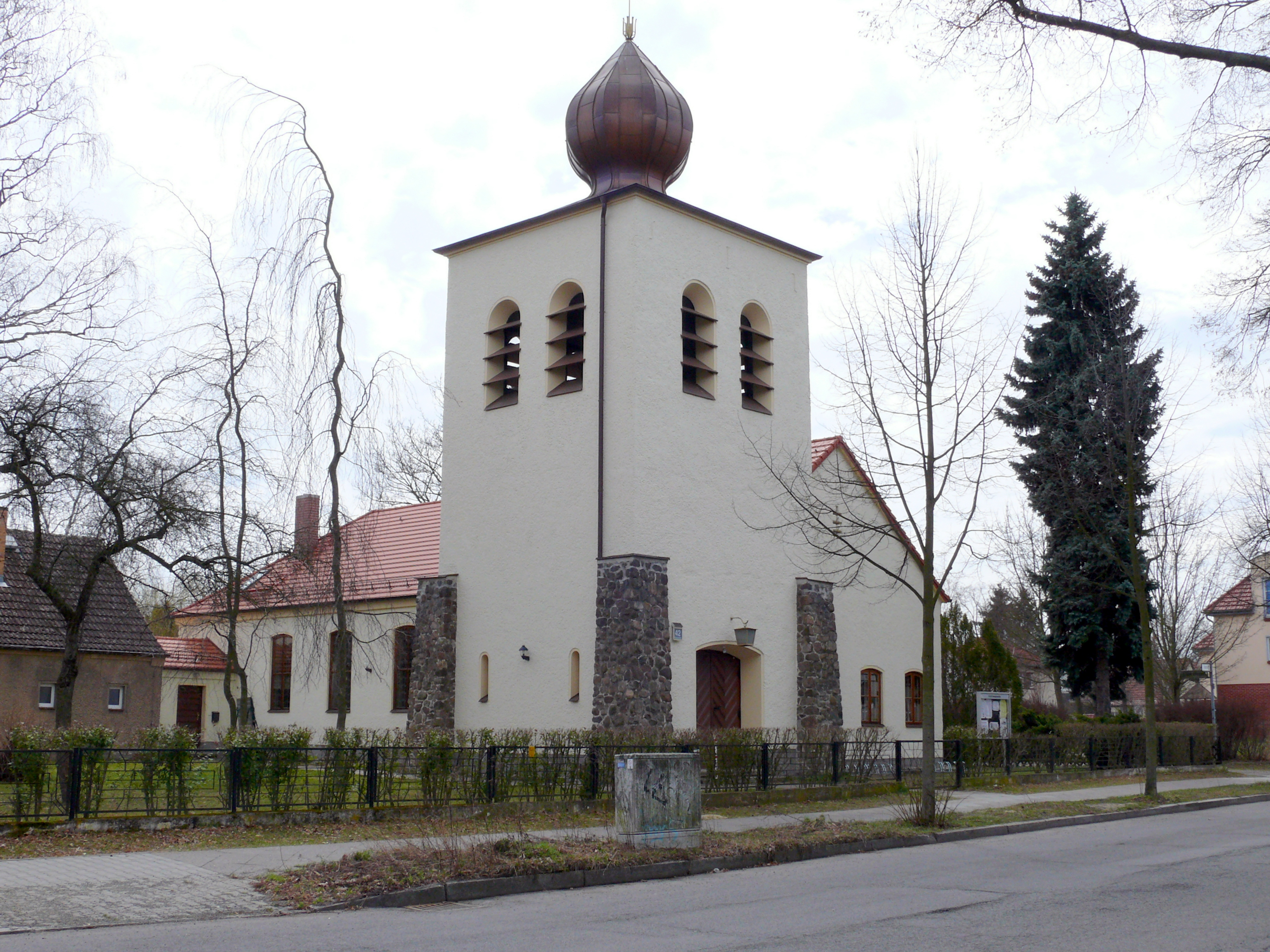 Ernst-Moritz-Arndt-Gemeindeheim Berlin-Altglienicke